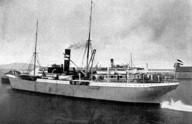 Der deutsche Dampfer Frieda Woermann